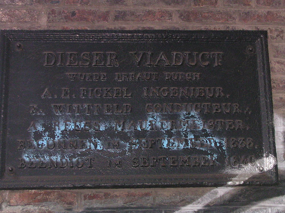 Erinnerungstafel am Burtscheider Eisenbahnviadukt (Aachen)